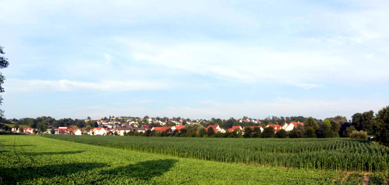 Mauer (Badenia-Wirtembergia), Niemcy